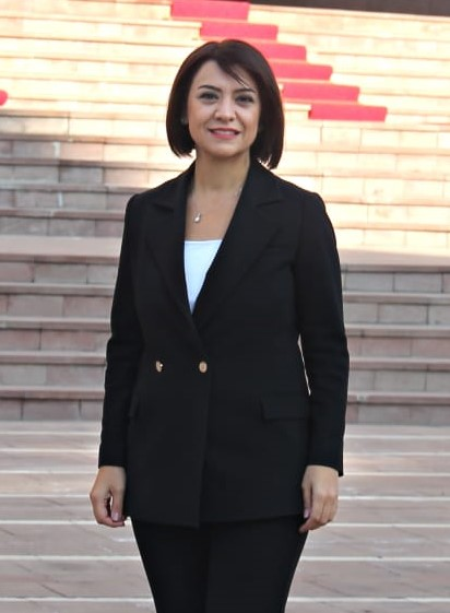 Ankara Milletvekili Gamze Taşcıer